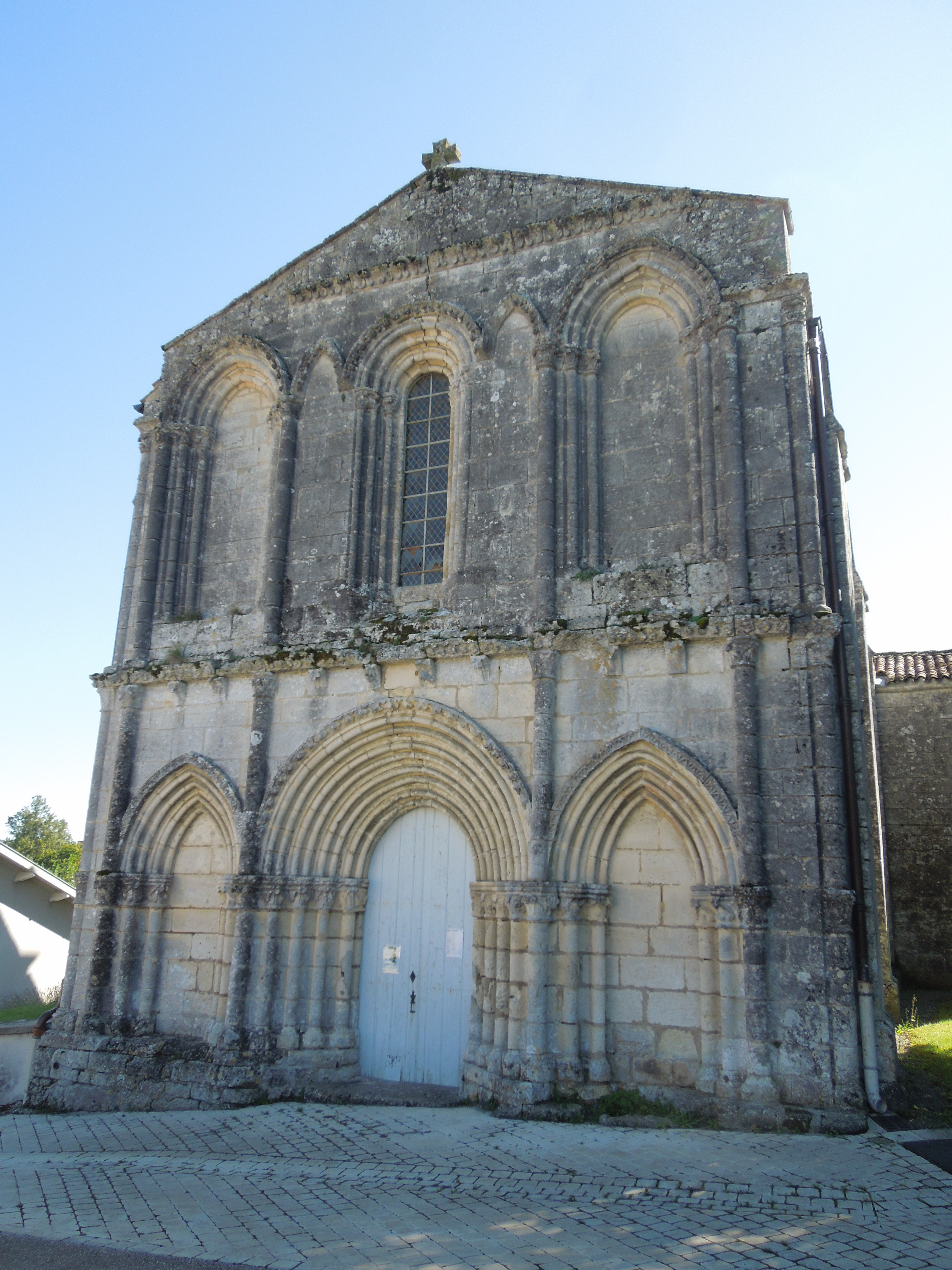 Die Westfassade der Pfarrkirche Saint-Pierre in Bonneuil